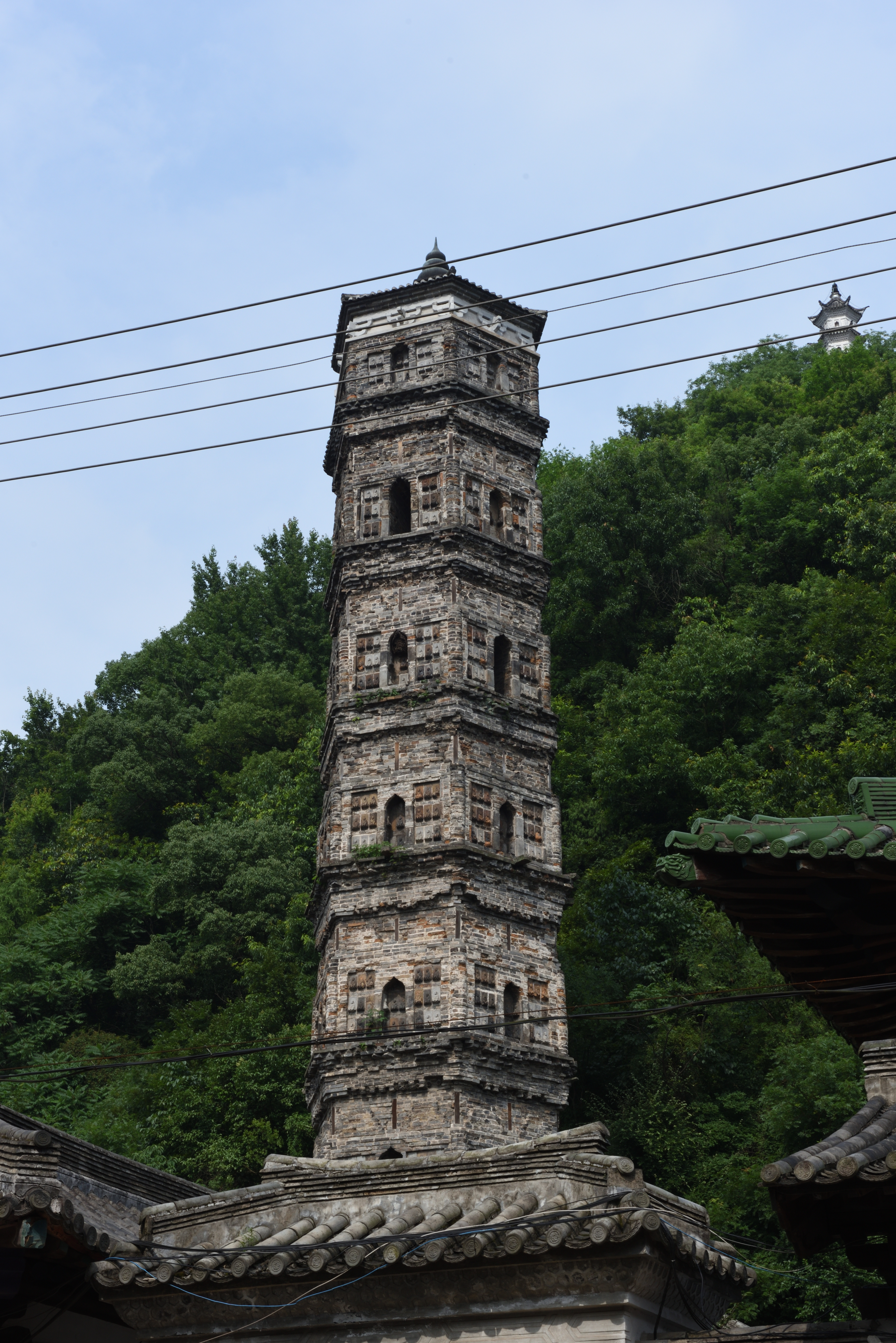 临海千佛塔